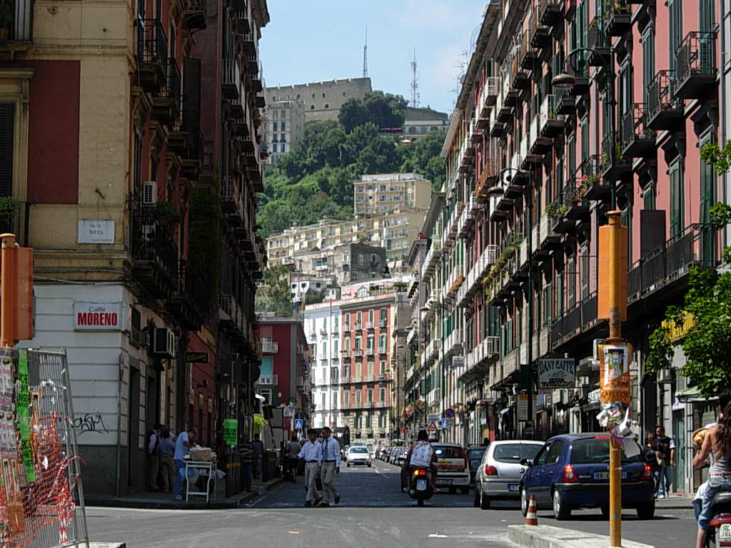 Corso Vittorio Emanuele in Napoli Foto personale concessa in PD